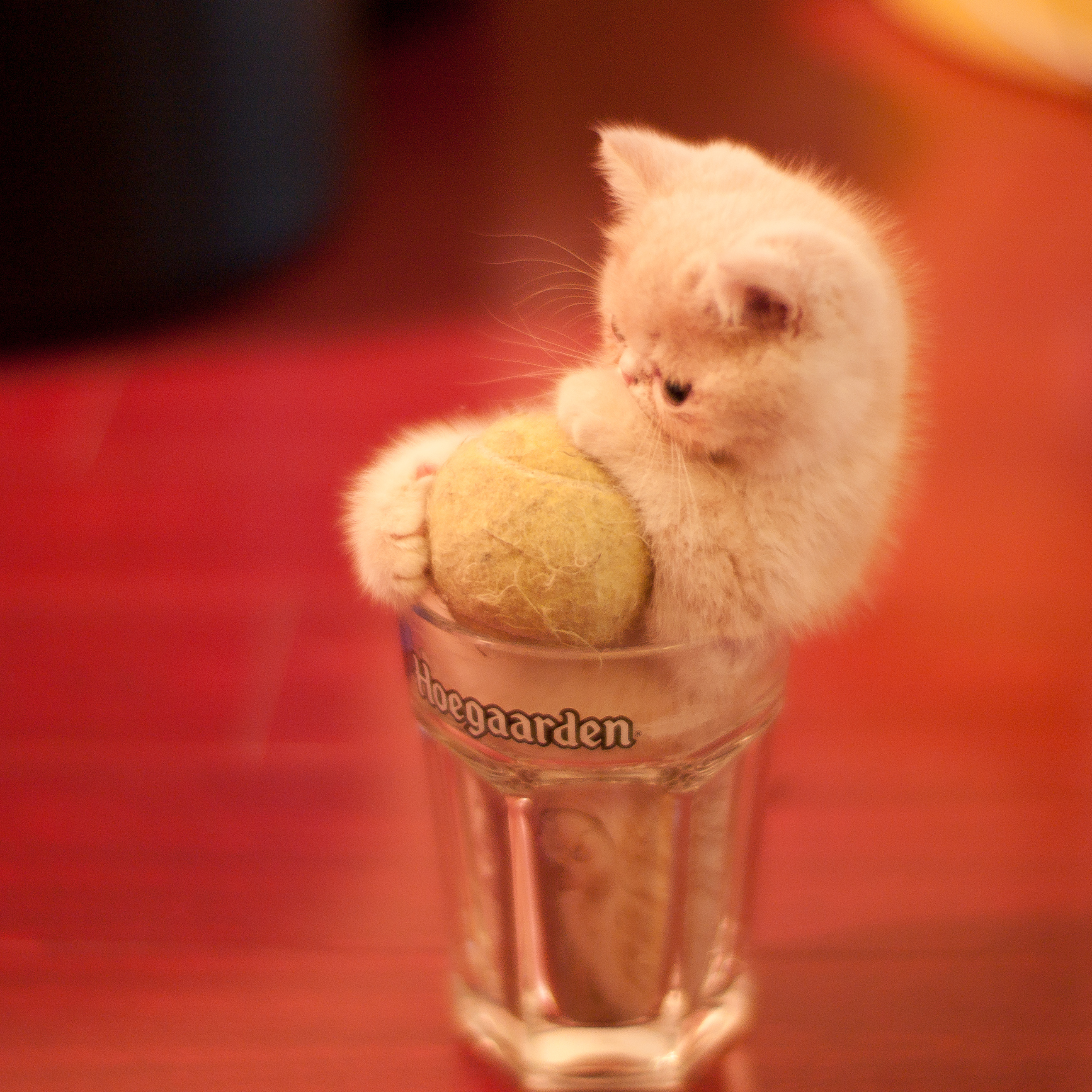 Humour sur les chatons bonsaïs.